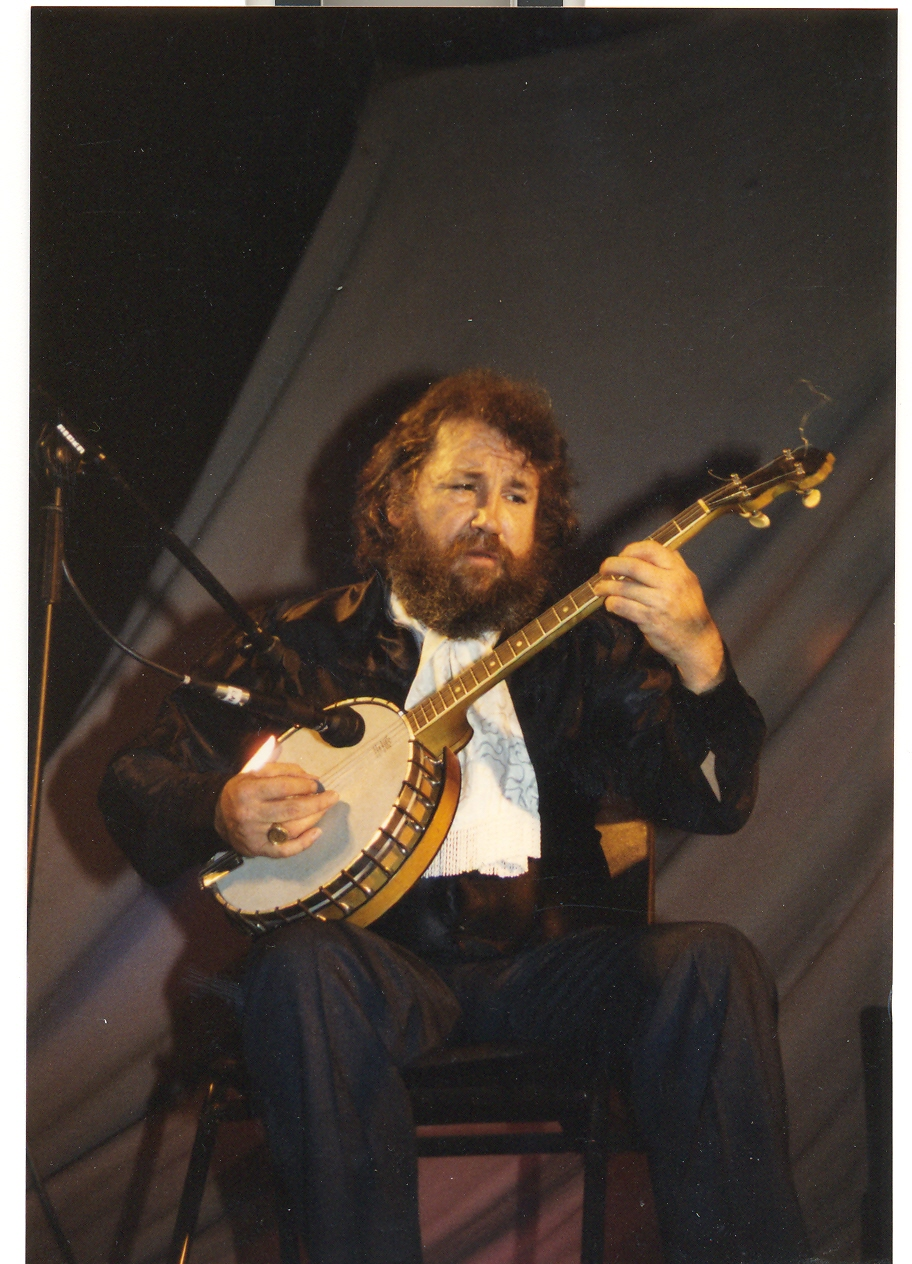 Barney McKenna is een Iers muzikant. Hij werd geboren op 16 december 1939 in Dublin, Ierland. Zelf gemaakte foto tijdens een concert in Eindhoven.